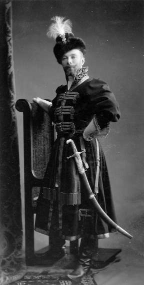 Князь В.Н.Оболенский, гвардии капитан Преображенского полка в наряде начального человека из жильцов времен царя Алексея Михайловича